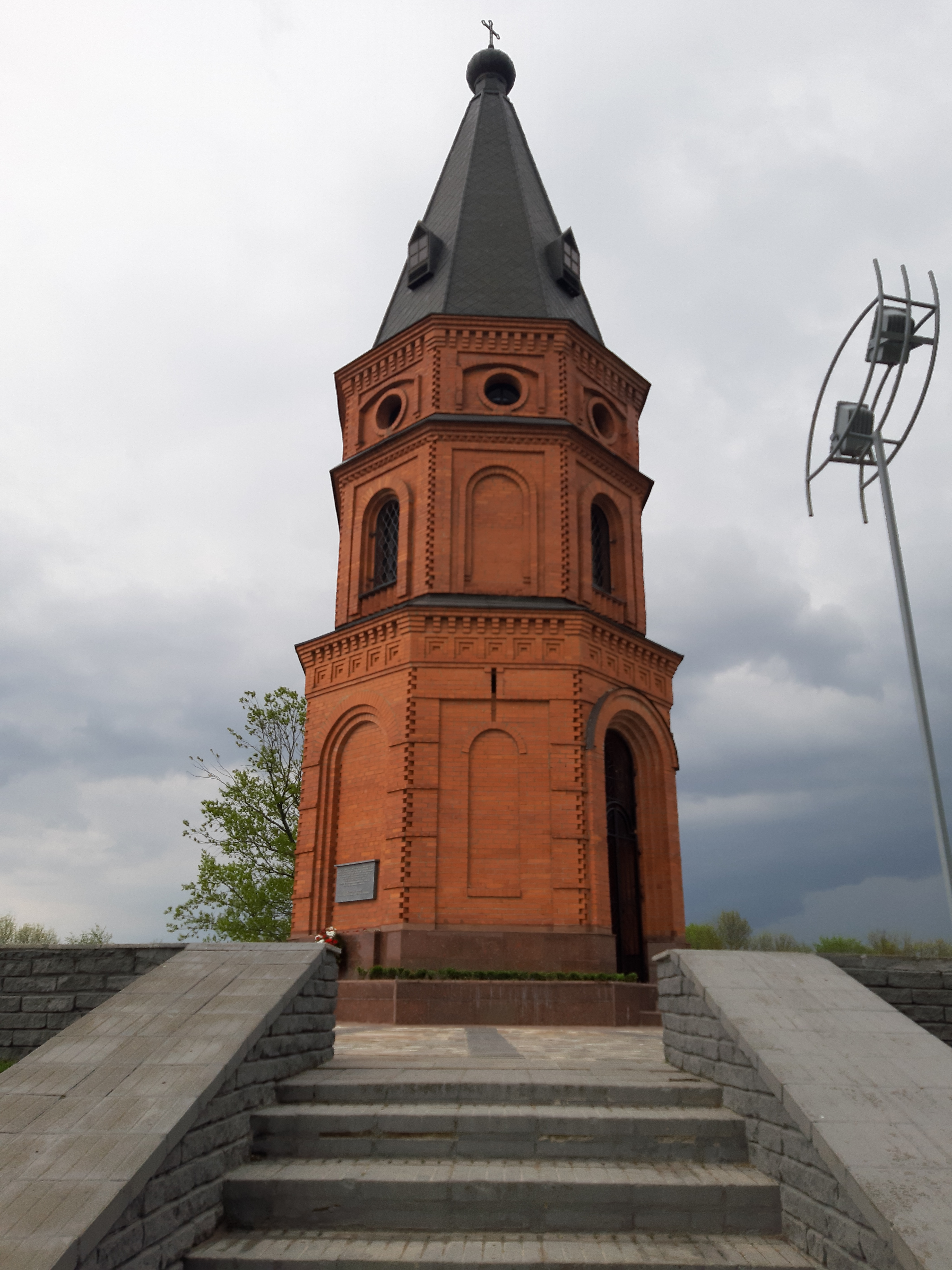 Мемарыял у Буйнічах